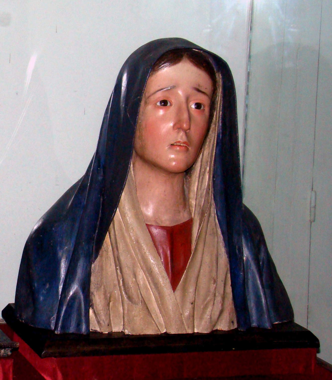 Dolorosa talla policromada de Pedro de Mena, en el museo catedralicio de Valladolid